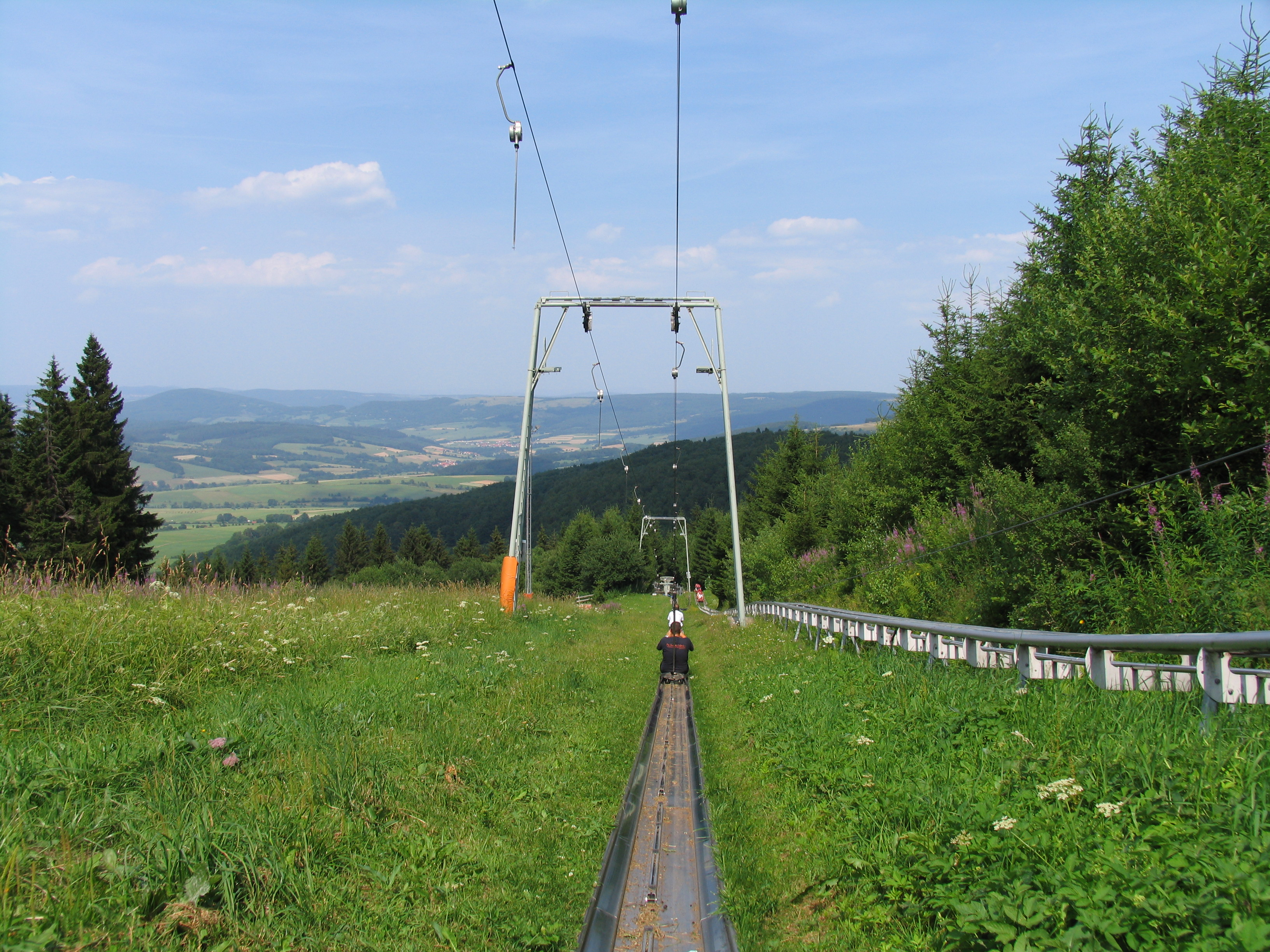 Lift Sommerrodelbahn Wasserkuppe, Germany